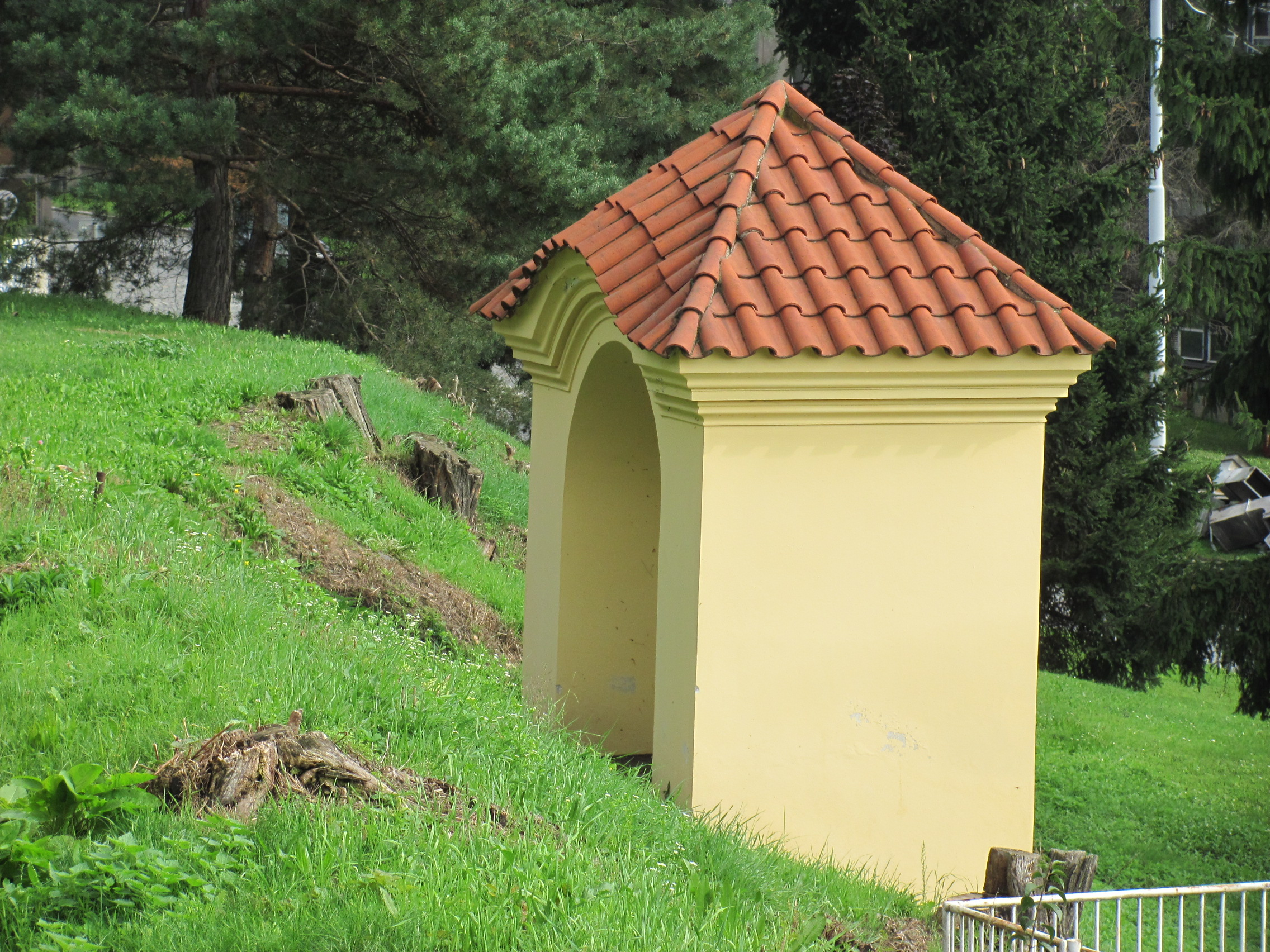 Výklenková kaplička u Kundratky, Praha 8-Libeň, Kundratka (za koncem ulice Pod bání), Libeň.